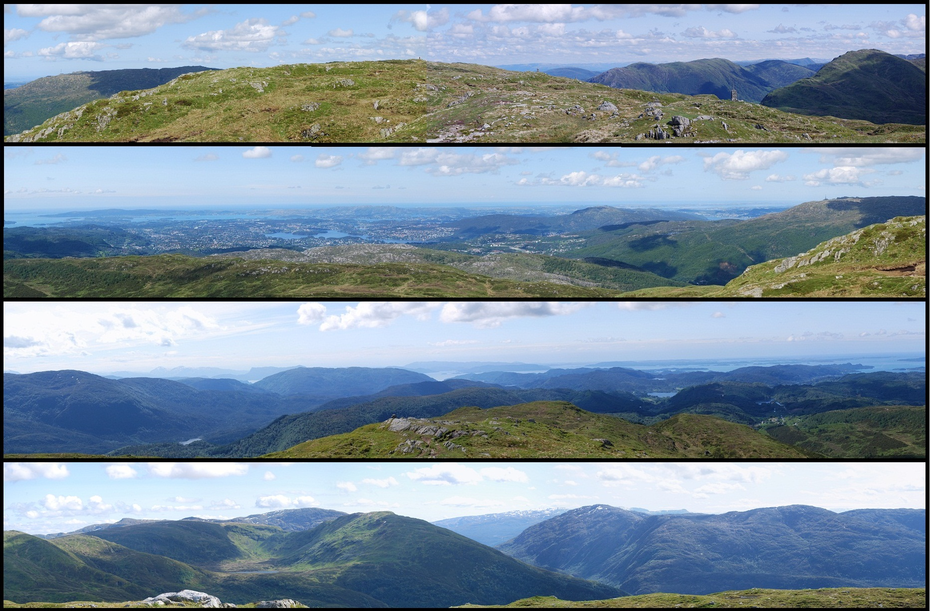 Description=Utsikt fra Livarden mot nord, vest, sør og øst